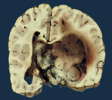 Plexuspapillom Sektionspräparat